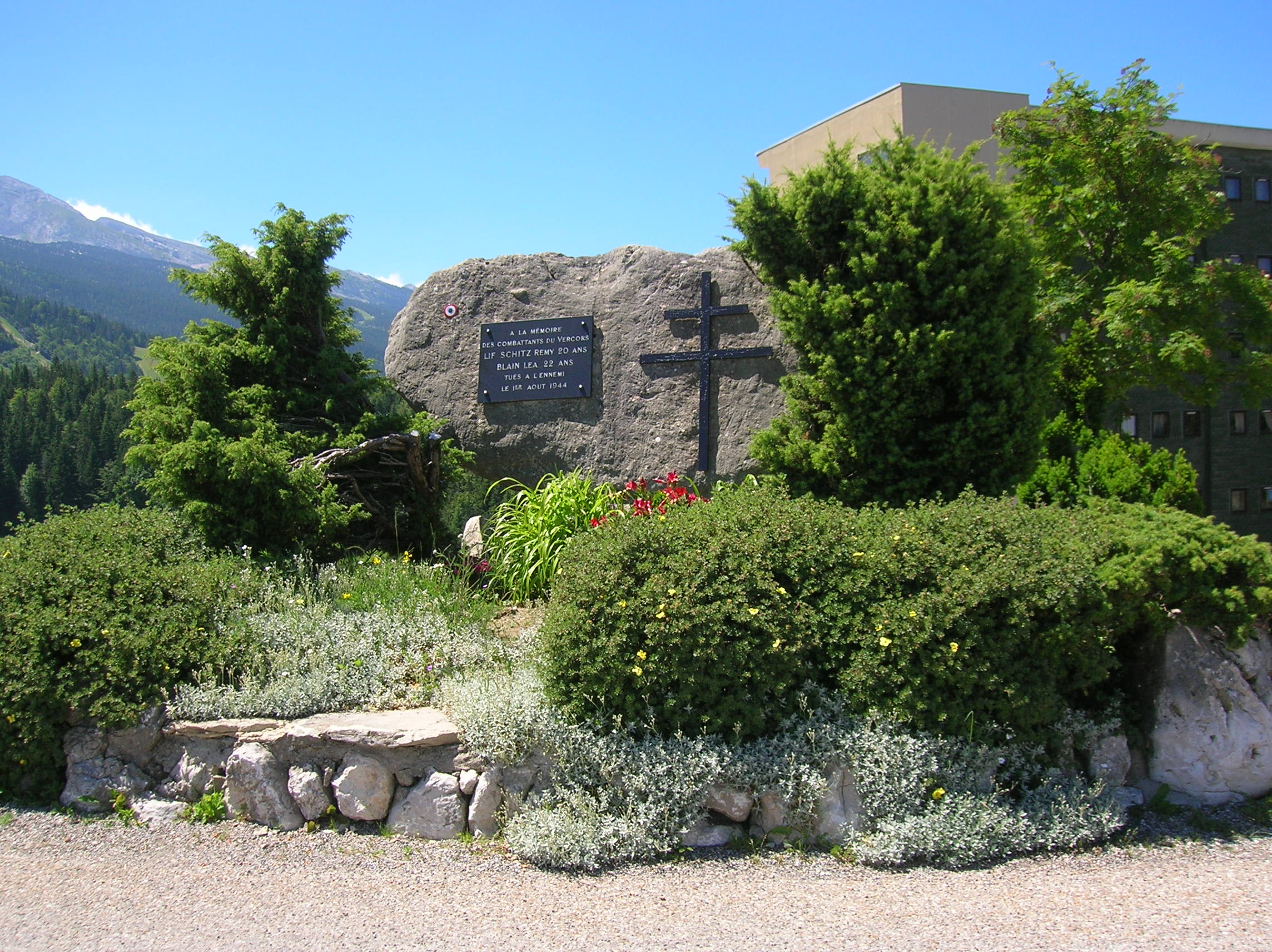 monument aux morts, monument à la resistence du vercors, Les Glovettes, Villard-de-Lans